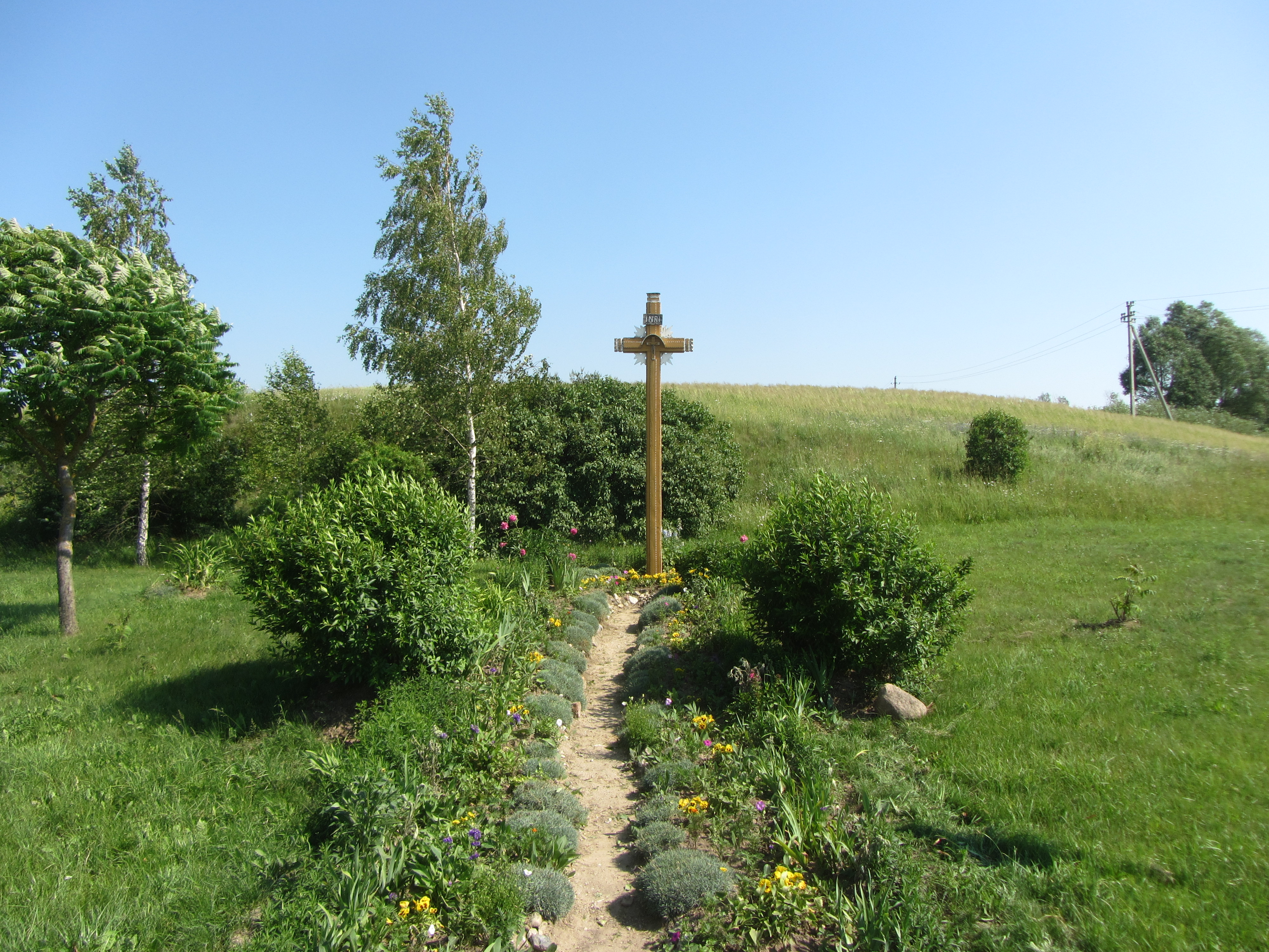 Mikyčiai 67206, Lithuania